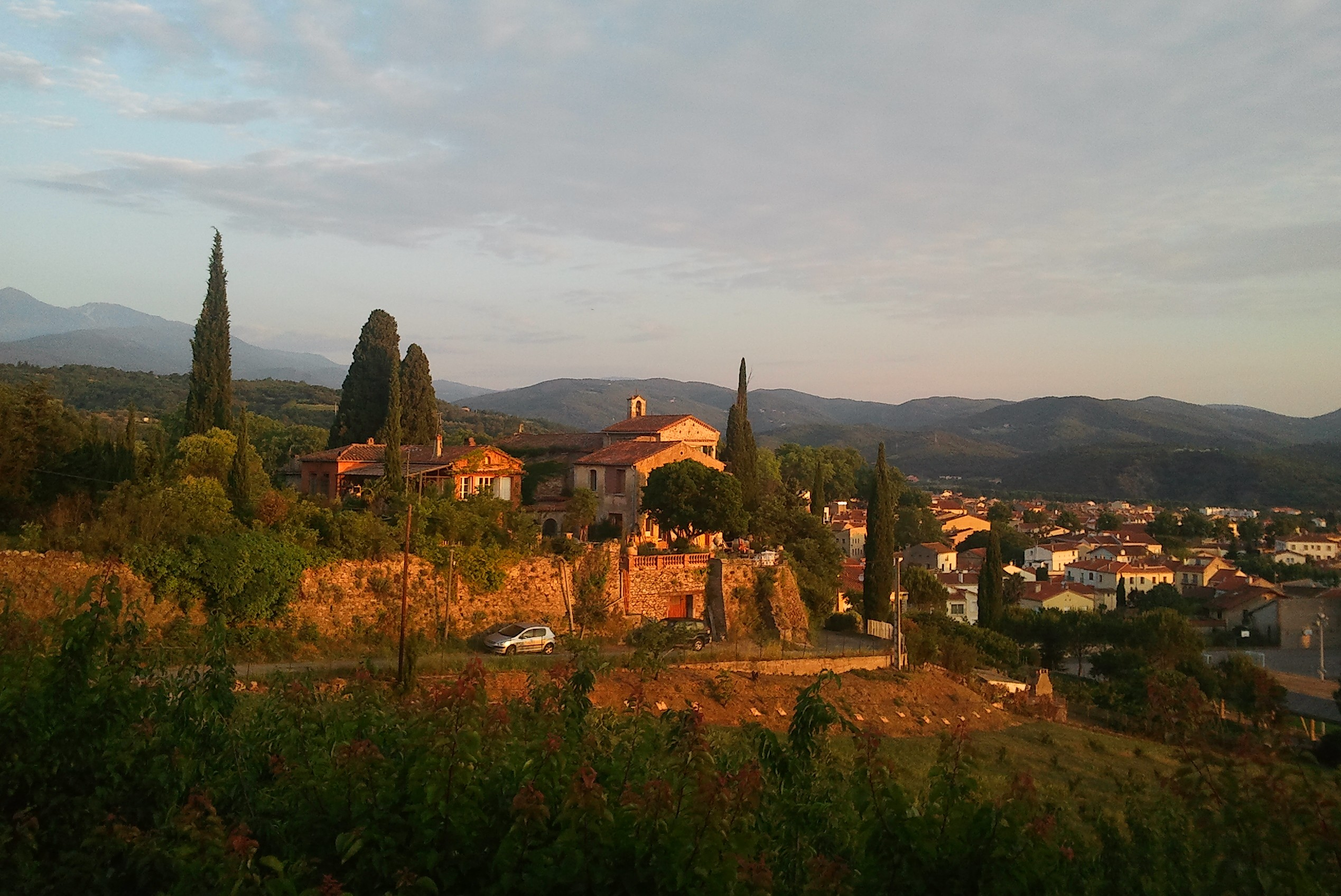 Site de l'ancien couvent des Capucins à l'aube l'été.